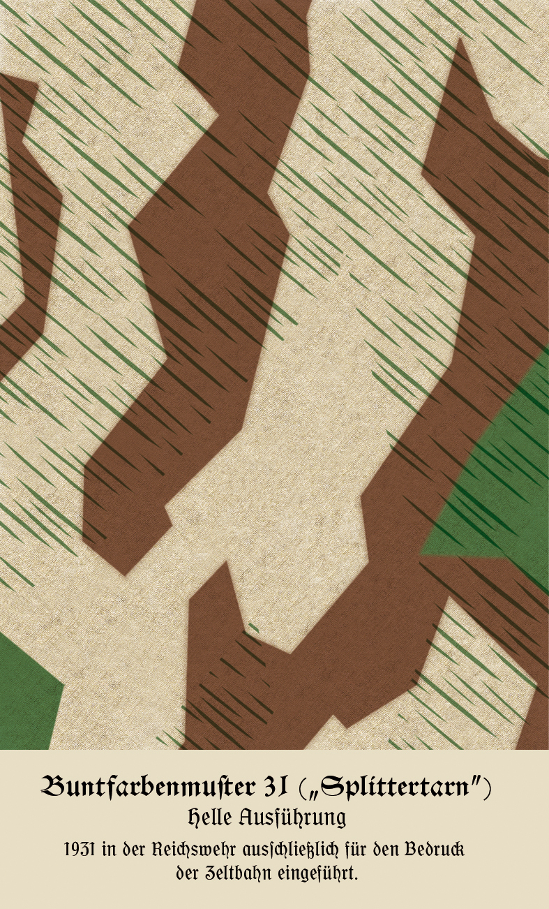 Buntfarbendruck der Reichswehr, 1931 für den Bedruck der Zeltbahn eingeführt.